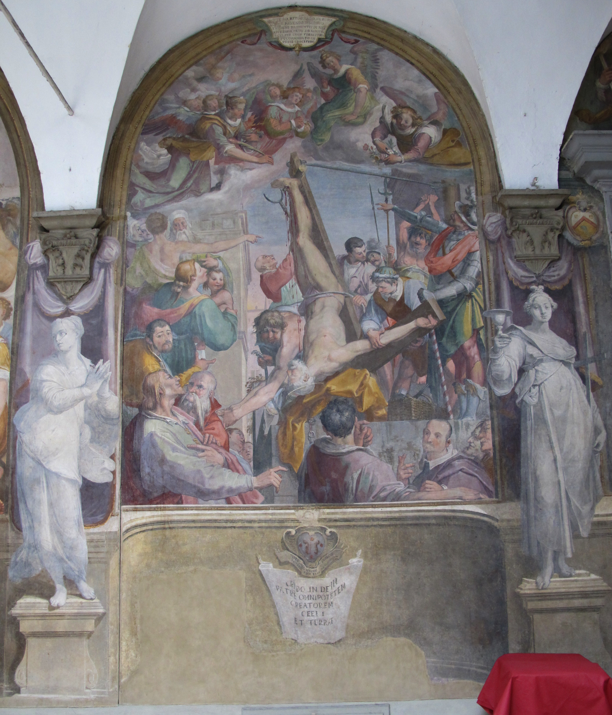 Chiostro di san pierino 06.1 poccetti, martirio di san pietro